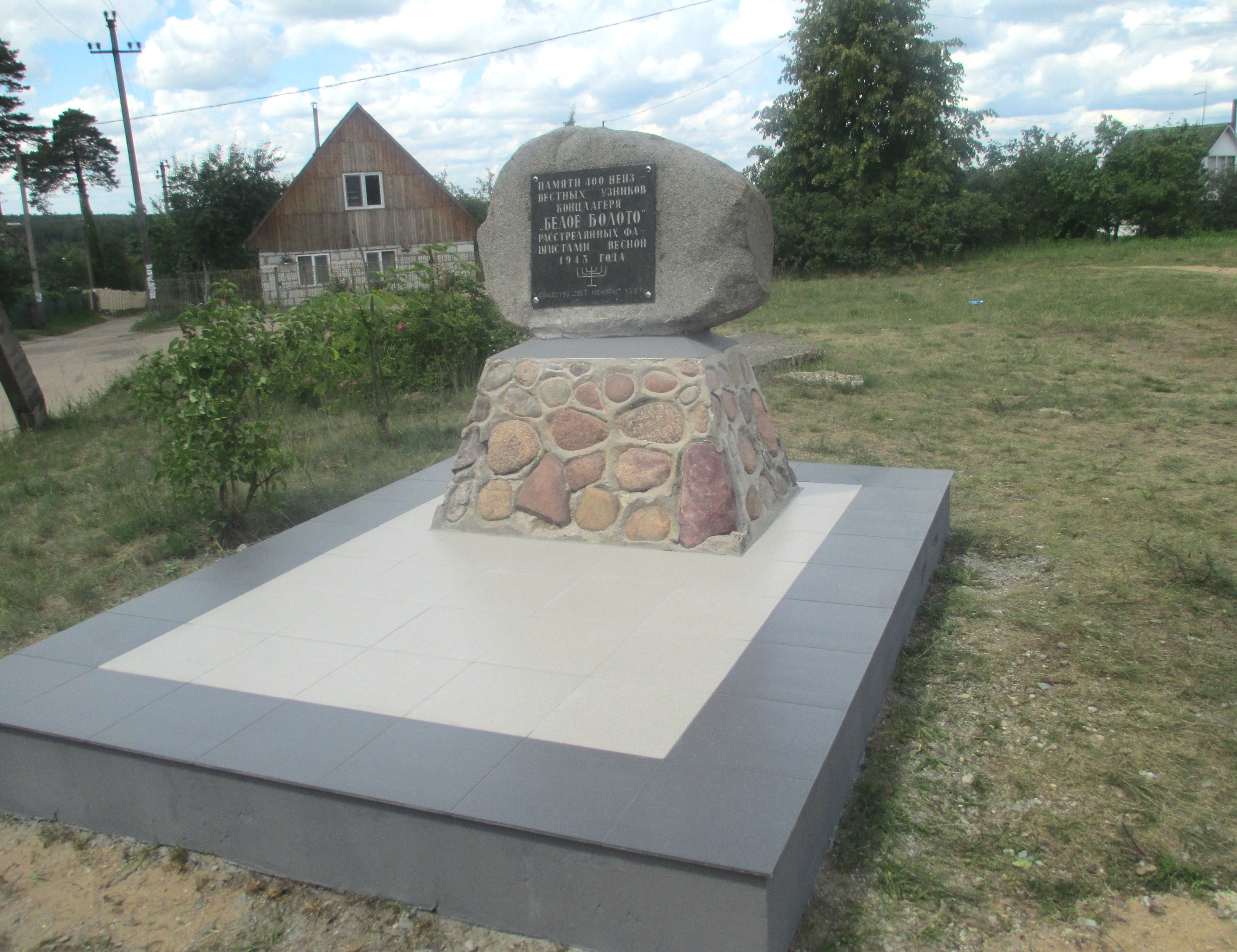 Символический памятник расстрелянным в этой местности в 1943 году около 400 евреям-специалистам из Западной Белоруссии, которых использовали как рабов в трудовом лагере при торфопредприятии «Белое Болото» (ныне поселок Красный Октябрь Борисовского района). Часть из этих евреев была переведена из гетто в Ивье Гродненской области. Установлен в 1997 году по инициативе и усилиями Еврейского общественного объединения «Свет Меноры» города Борисов.